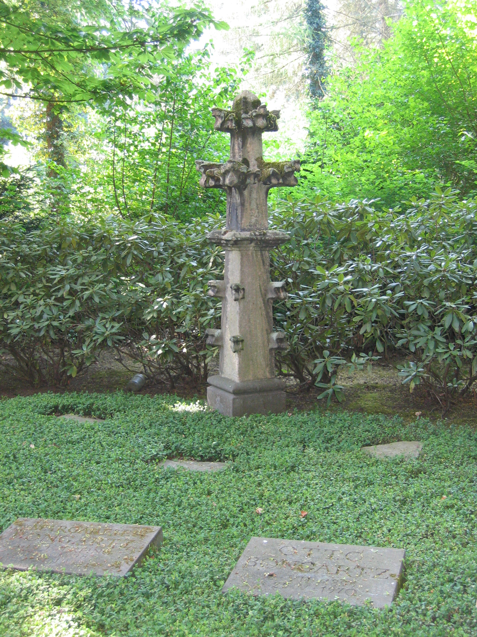 Südfriedhof (Köln)